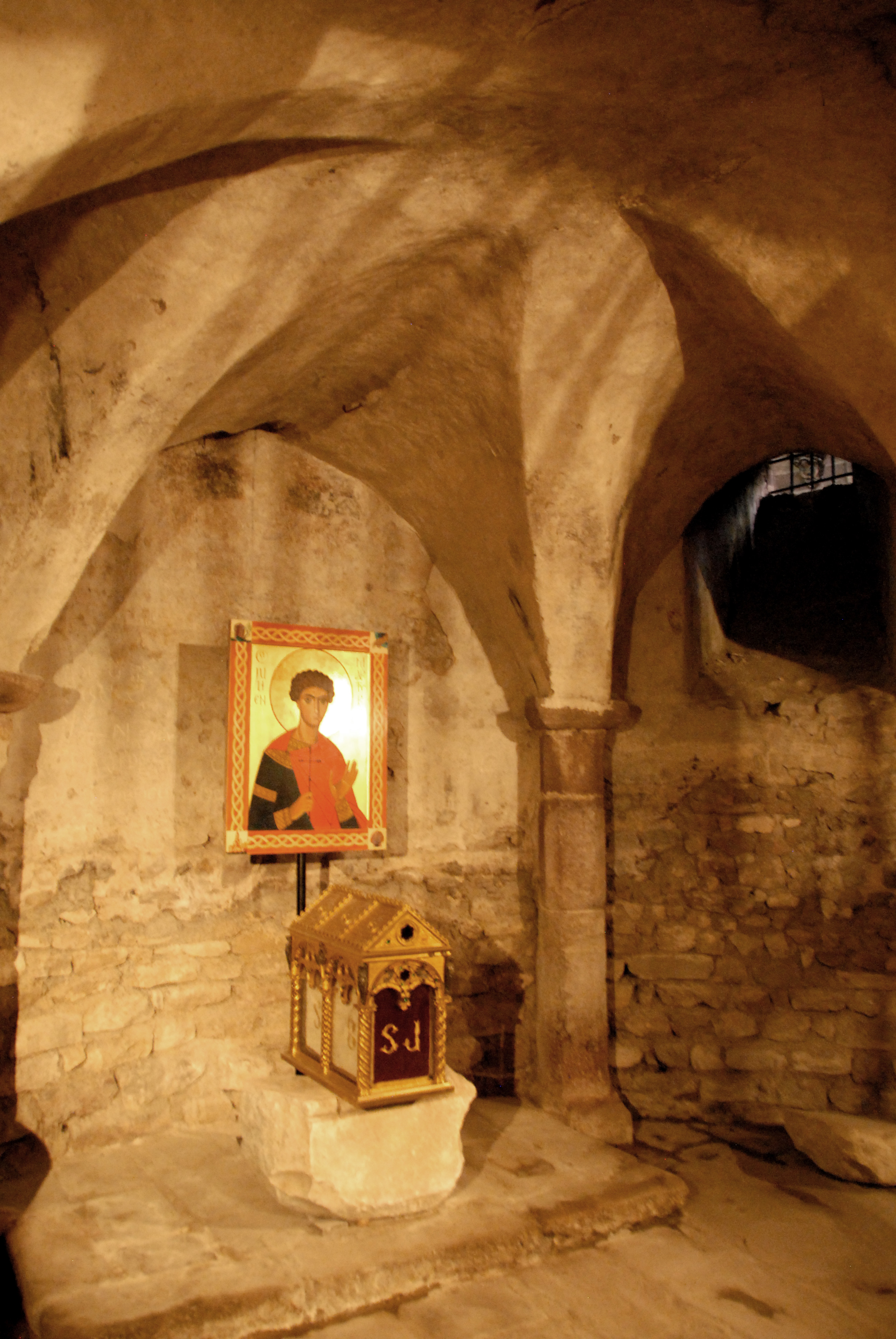 Saint-Julien Brioude, "Krypta"